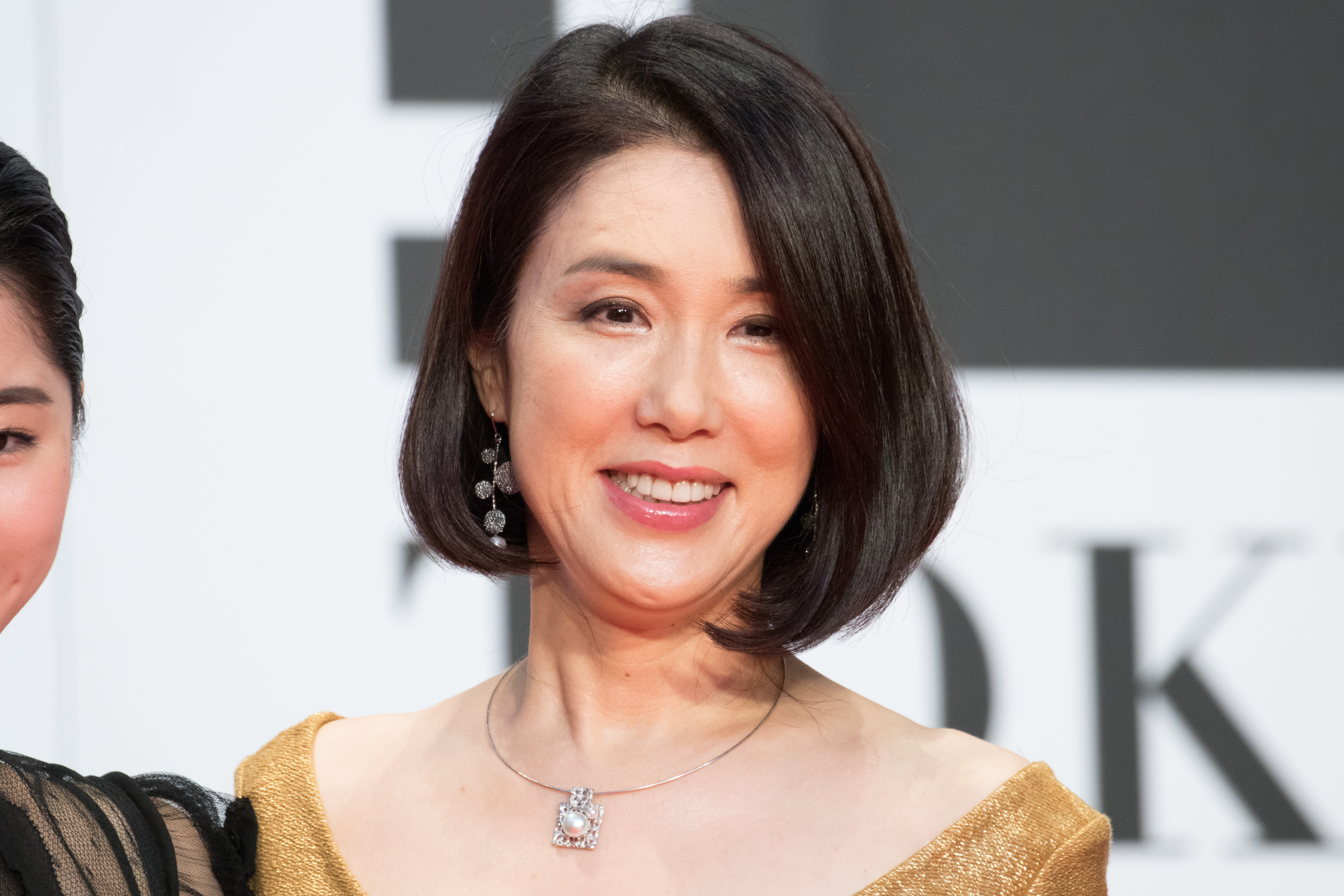 第29回 東京国際映画祭 オープニングセレモニー 筒井真理子 (淵に立つ)